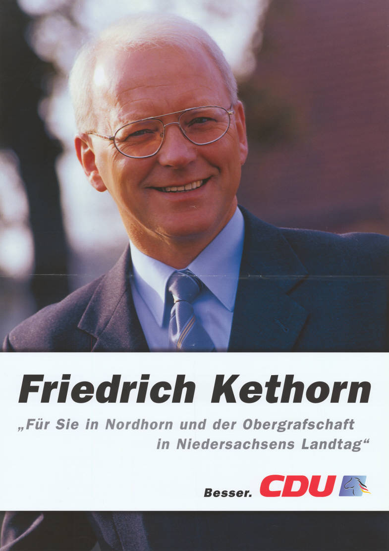 Friedrich Kethorn "Für Sie in Nordhorn und der Obergrafschaft in Niedersachsens Landtag" Besser. CDU Abbildung: Porträtfoto - Niedersachsenross mit Nationalfarben Plakatart: Kandidaten-/Personenplakat mit Porträt Objekt-Signatur: 10-008 : 1315 Bestand: Landtagswahlplakate Niedersachsen (10-008) GliederungBestand10-18: Landtagswahlplakate Niedersachsen (10-008) » CDU Lizenz: KAS/ACDP 10-008 : 1315 CC-BY-SA 3.0 DE